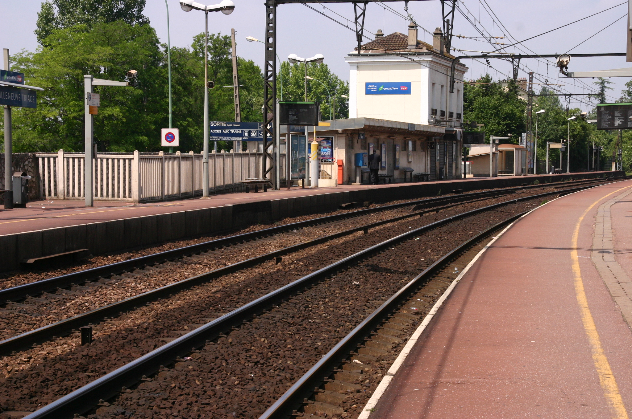 La gare de Villeneuve-Triage, Villeneuve-Saint-Georges, département du Val-de-Marne, France